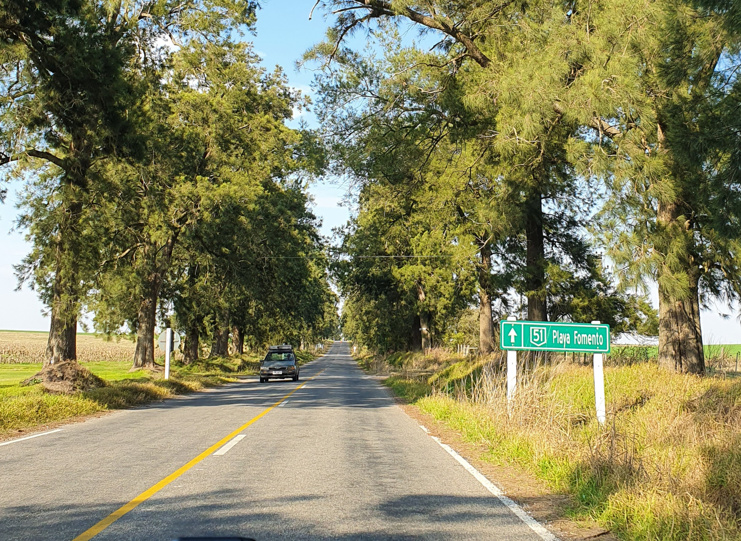 Ruta 51, sentido sur, próximo a Fomento. Colonia, Uruguay.